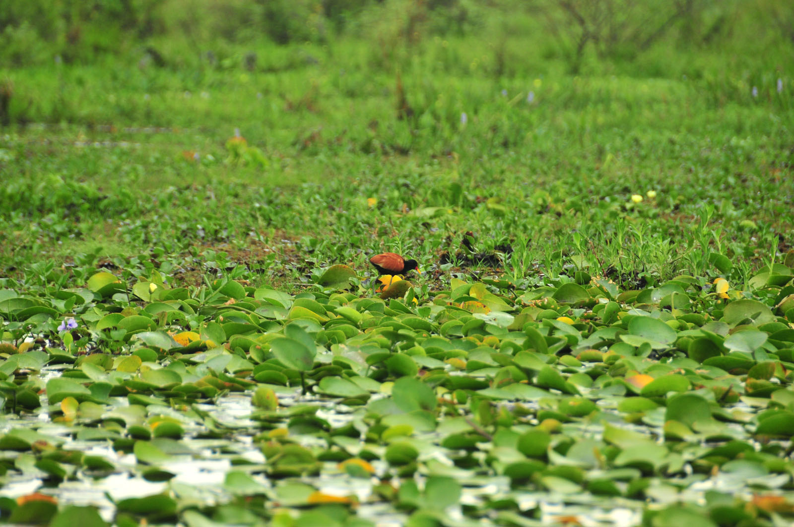 Vista de los esteros del Iberá. Fotos de los Esteros del Iberá en Argentina